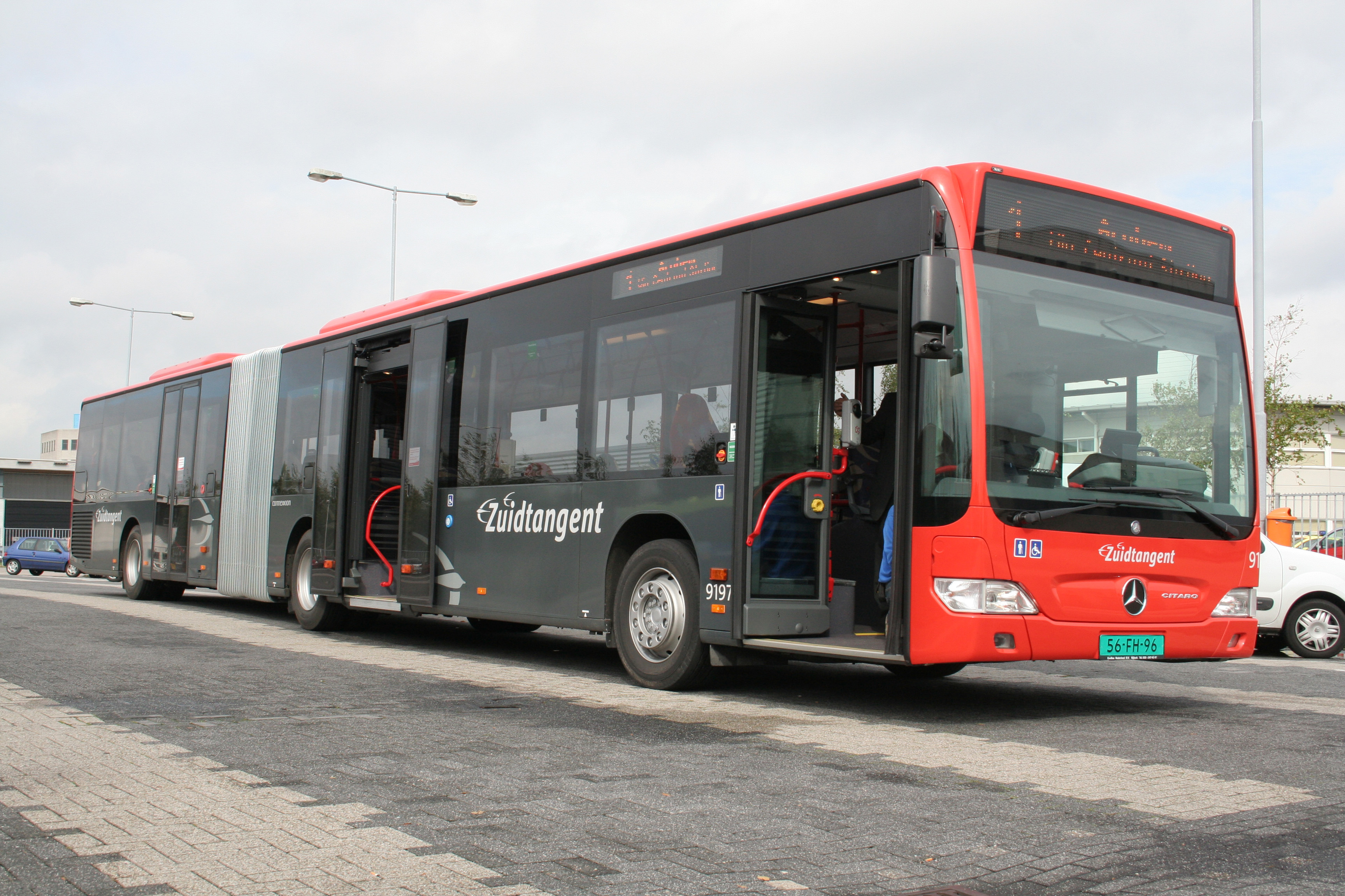 Zuidtangent